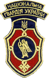 Нарукавний знак, 1 Київська дивізія НГУ